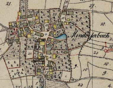 Menderdorfbuch Urkataster von Bayern